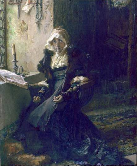 La obra muestra a la reina Juana I de Castilla (1479-1555), apodada la Loca, recluida en el municipio vallisoletano de Tordesillas, donde permaneció encerrada durante varias décadas.